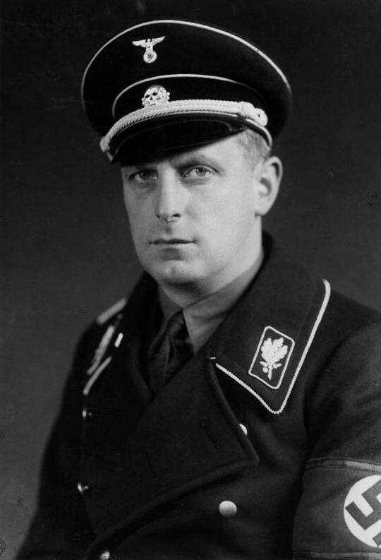 Werner Lorenz Scherl Bildedienst Berlin SS-Gruppenführer [Werner] Lorenz Fotograf: Fritz Krauskopf, Königsberg 18703-34 [Werner Lorenz, SS-Gruppenführer, Porträt] Abgebildete Personen: Lorenz, Werner (GND 130506710): SS-Obergruppenführer, Leiter der Volksdeutschen Mittelstelle, Deutschland